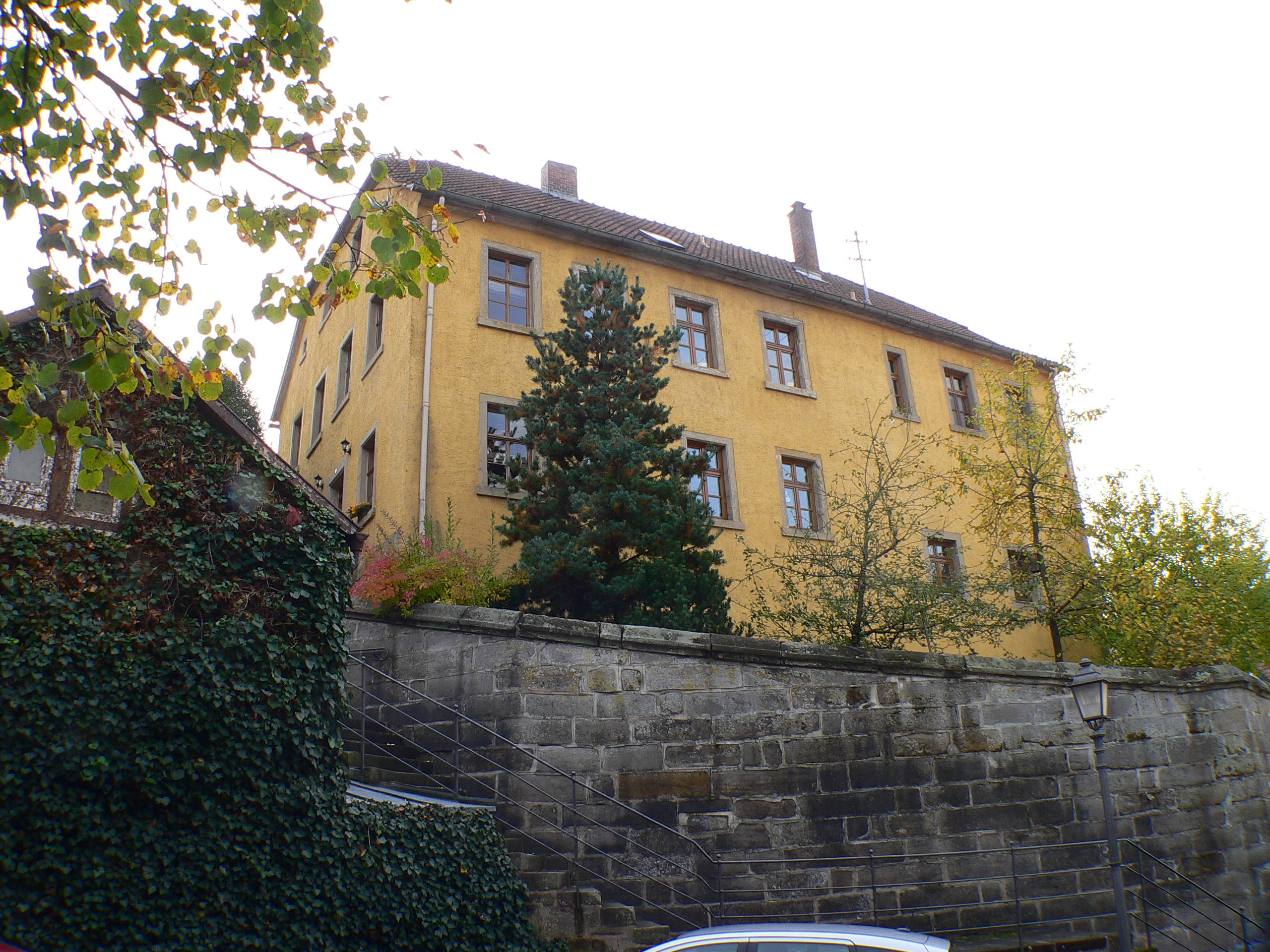 Mittleres/Altes Schloss in Küps, Bayern, Regierungsbezirk Oberfranken, Landkreis Kronach